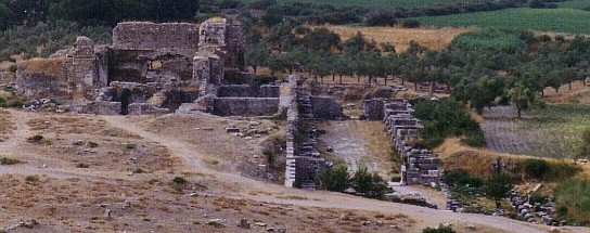 Milet. Überreste der Faustina-Thermen, Zustand 1997. Der lange Saal ist das Apodyterium, rechts daneben erkennt man den kleinen freigelegten Bereich der Palästra. Links schließen sich die eigentlichen Baderäume an. 1997 fotografiert durch I. Panteleon.